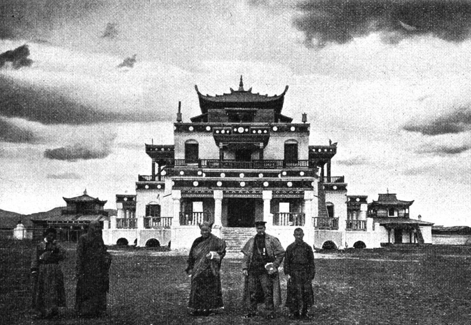 1904, Zogtschen-Dugan (цогчен-дуган) im Sartul-Gegetui-Dazan. Сартул-Гэгэтуйский дацан, село Гэгэтуй, Джидинский район, Республика Бурятия